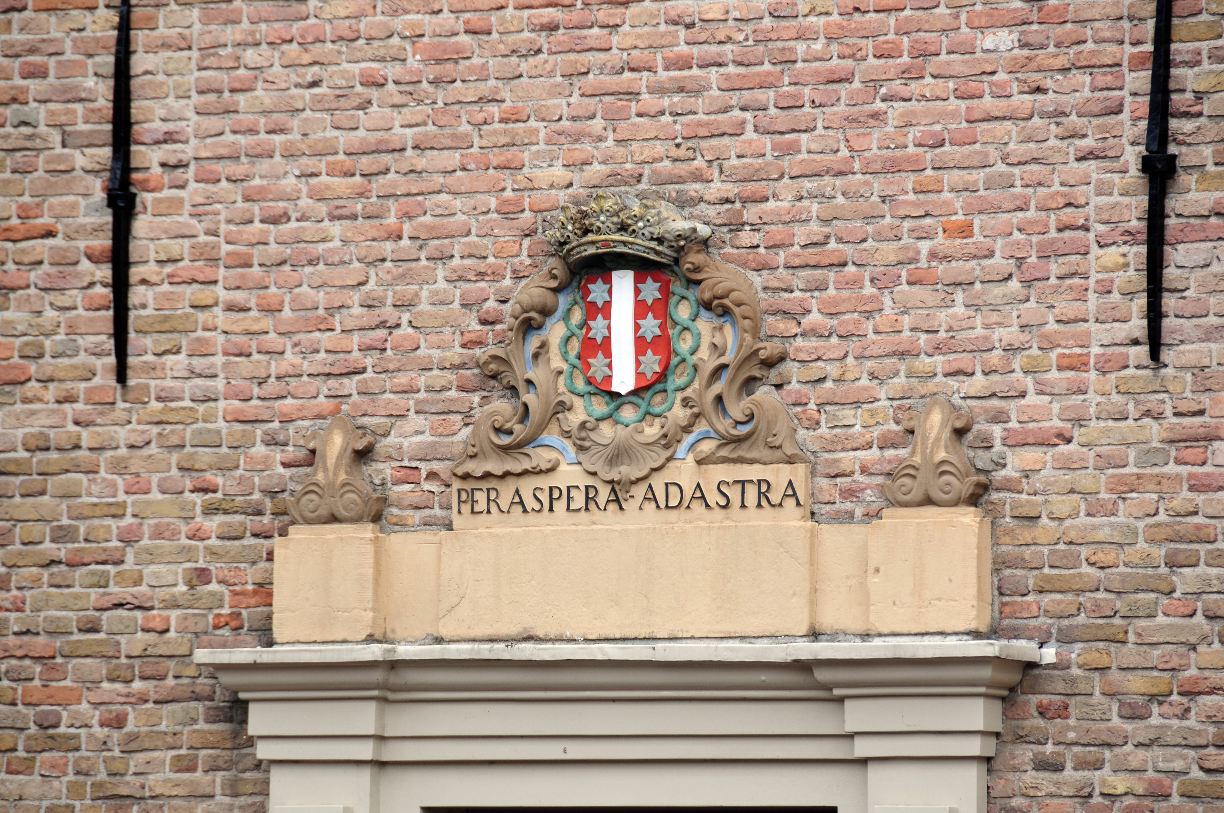 Gouda, Niederlande, Stadtzentrum